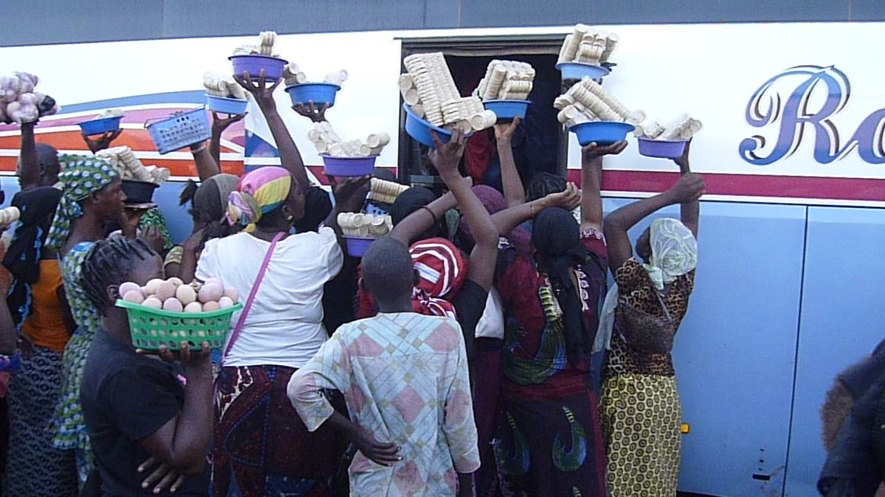 Burkina Faso - Boromo - Ville escale des bus sur la route Abidjan - Ouagadougou (24 H de trajet). Ceux-ci sont pris d'assaut par les vendeurs de nourriture pour les voyageurs. This is an image with the theme "Africa on the Move or Transport" from: Burkina Faso